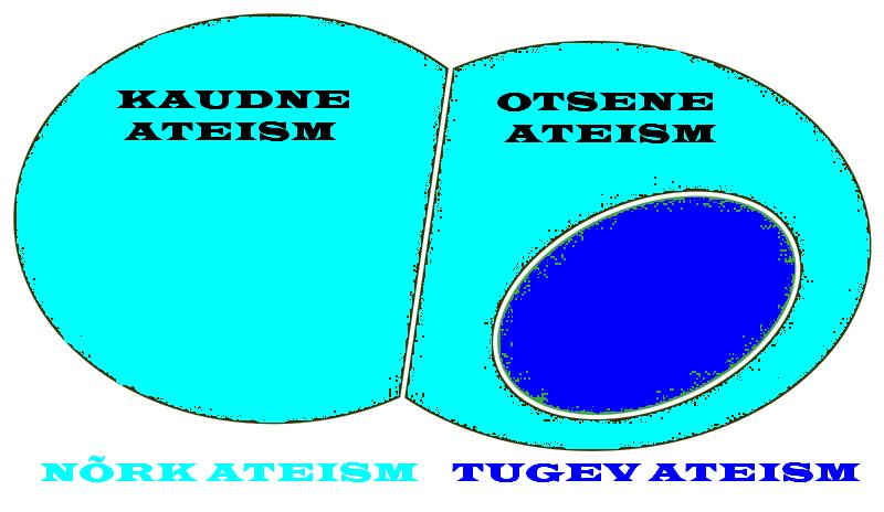 Kirjeldab nõrka ja tugevat ateismi.